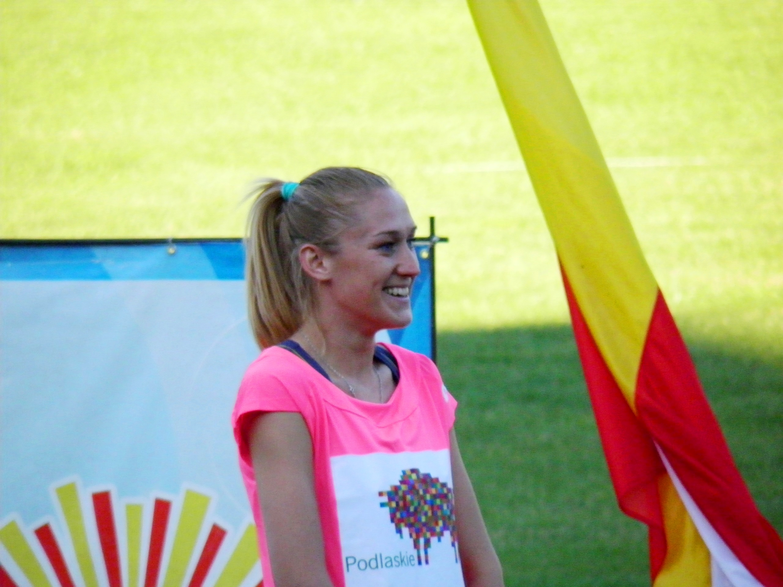 Kamila Lićwinko zawodniczka KS Podlasie